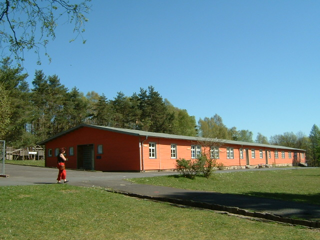 Das Kinderdorf Wegscheide ist das Schullandheim der Stadt Frankfurt am Main , im Bereich der Stadt Bad Orb. Dort wird auch Unterricht abgehalten. Hier: Das aus dem alten Schlotterhaus entstandene Projekthaus.